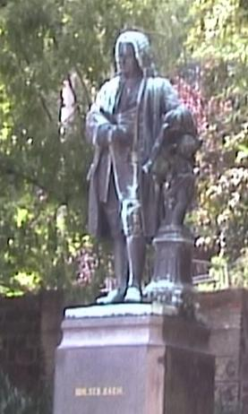 Das Bachdenkmal in Eisenach